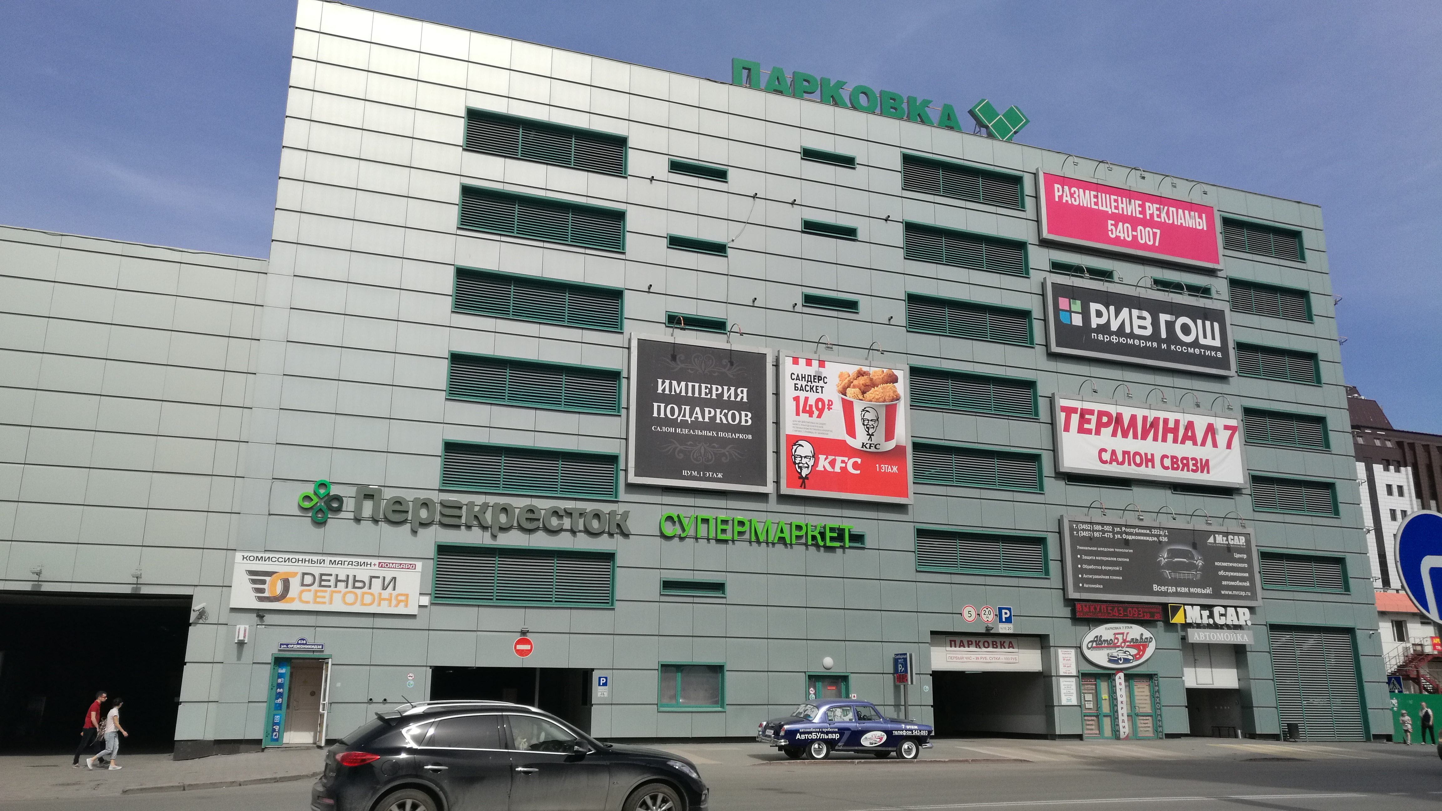 Pluretaĝa parkumejo en strato Herzen. Tjumeno, Rusio.